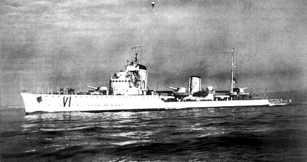 Barco antiguo